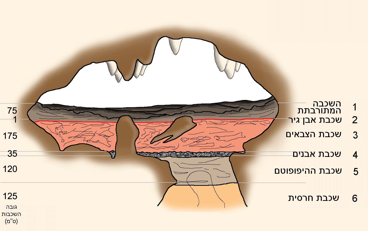 אר גאלם